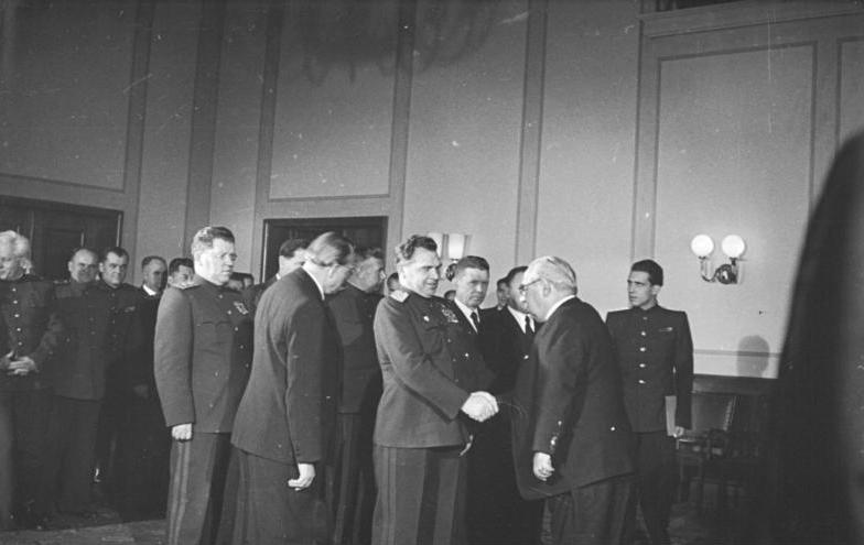 ADN-ZB SNB Empfang bei Armee-General W.J. Tschuikow am 11.11.1949. Armeegeneral W.J. Tschuikow, der Chef der neugeschaffenen Sowjetischen Kontrollkommission (SKK), der die Kontrolle über die Durchführung der Bestimmungen und Prinzipien des Potsdamer Abkommens obliegt, empfängt die Mitglieder der Regierung der Deutschen Demokratischen Republik. Die SKK löst die Sowjetische Militär-Administration (SMA) ab, deren Funktionen an die deutschen Staatsorgane übergeben. UBz: Armeegeneral W.J. Tschuikow begrüßt den Minister Hermann Kastner, links Ministerpräsident Otto Grotewohl. 4547-49